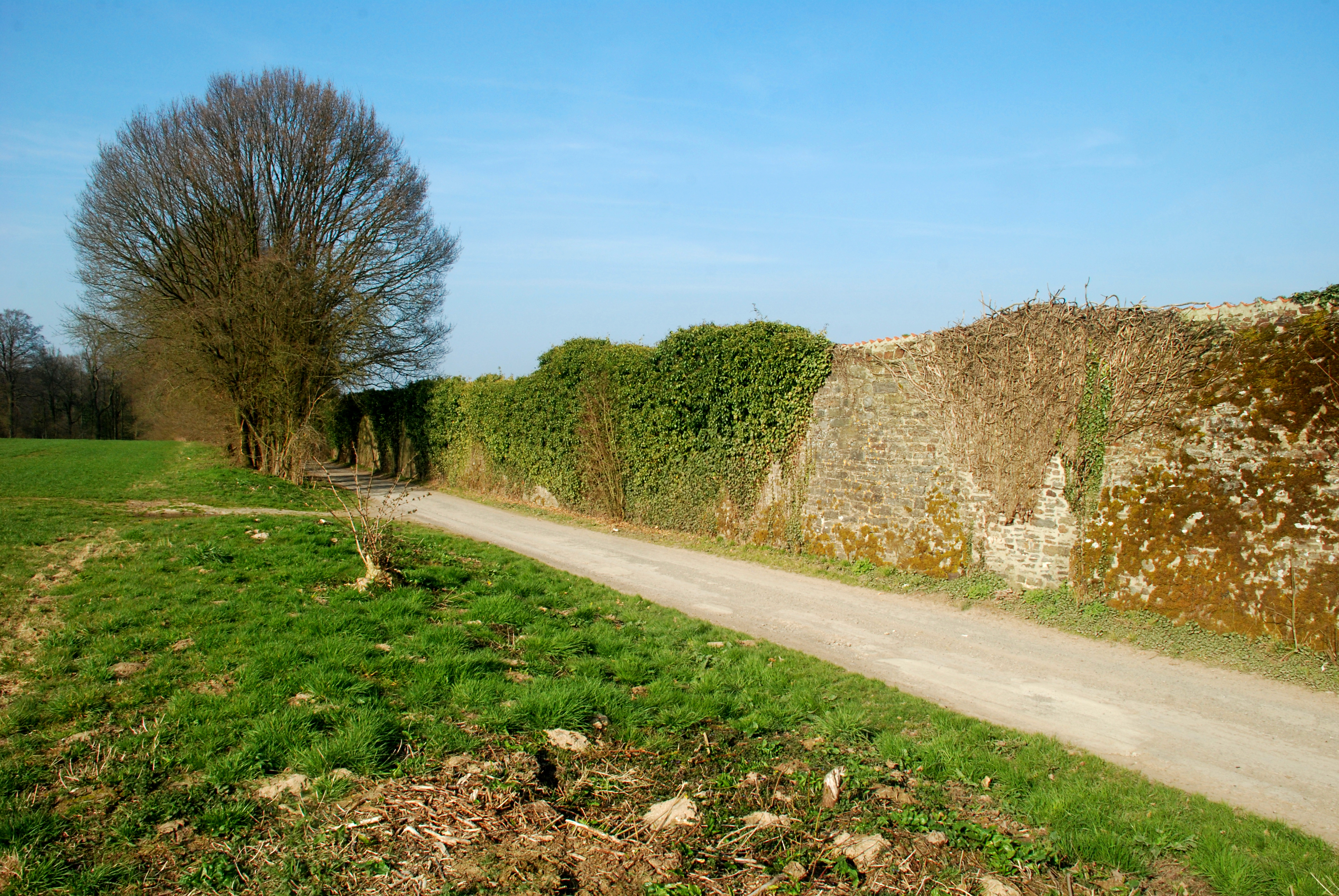 Belgique - Brabant wallon - Mur d'enceinte de l'abbaye de Villers-la-Ville